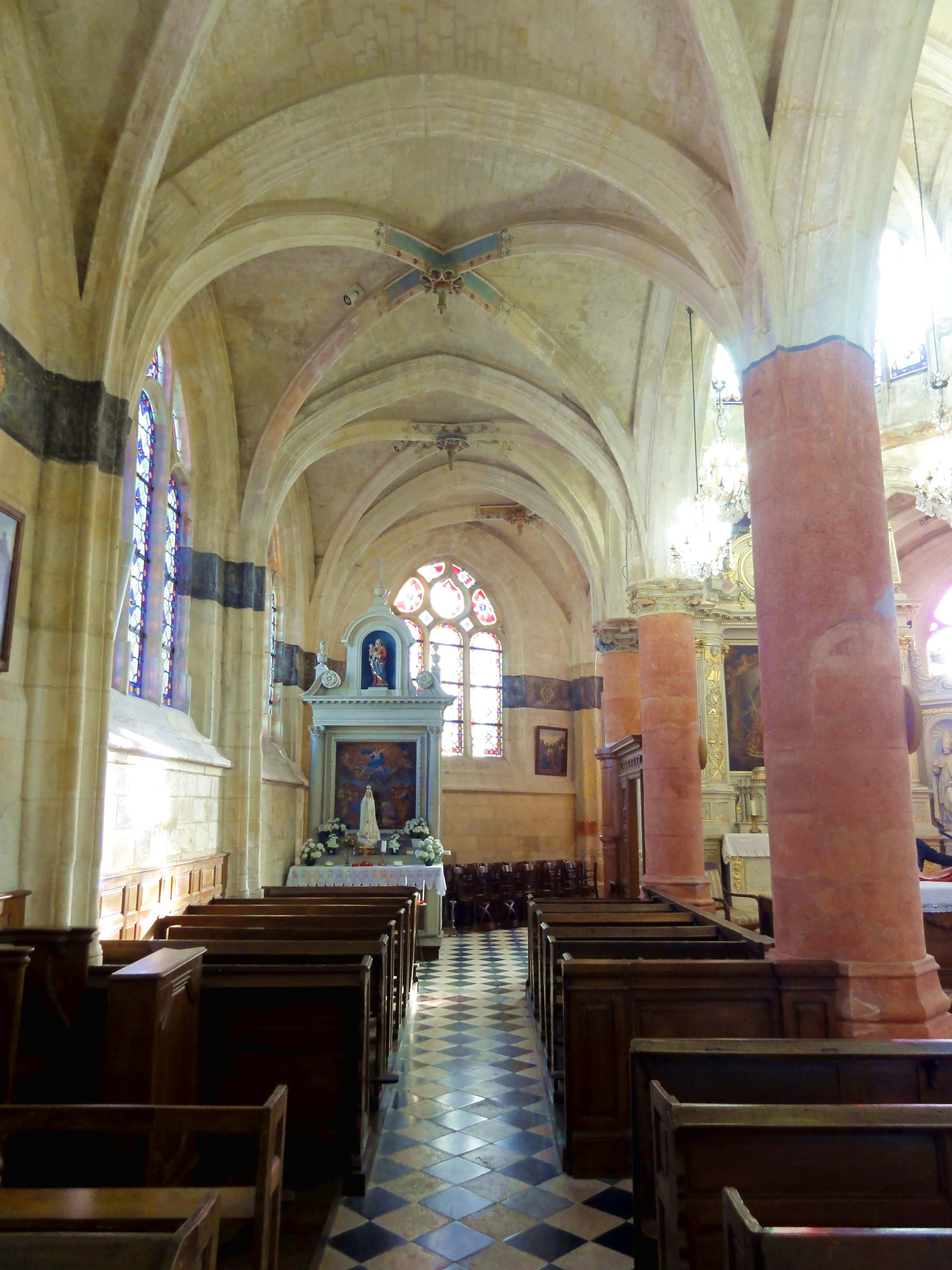 Intérieur de l'église - voir titre.